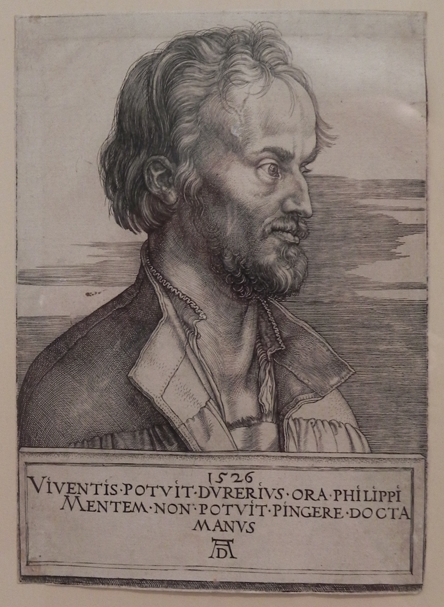 Philipp Melanchton, Kupferstich